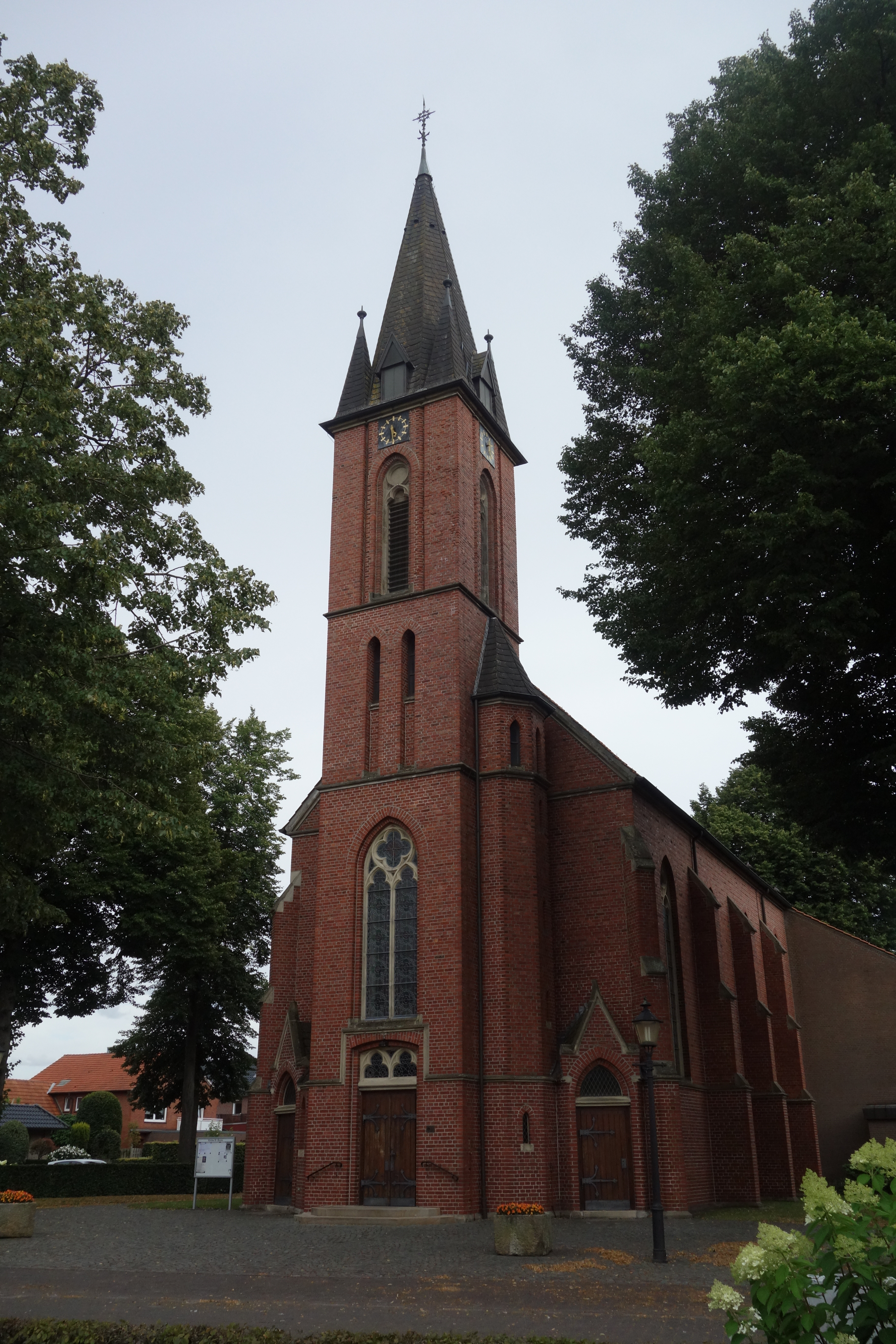 Kirche St. Bruno, Lünten (Deutschland)